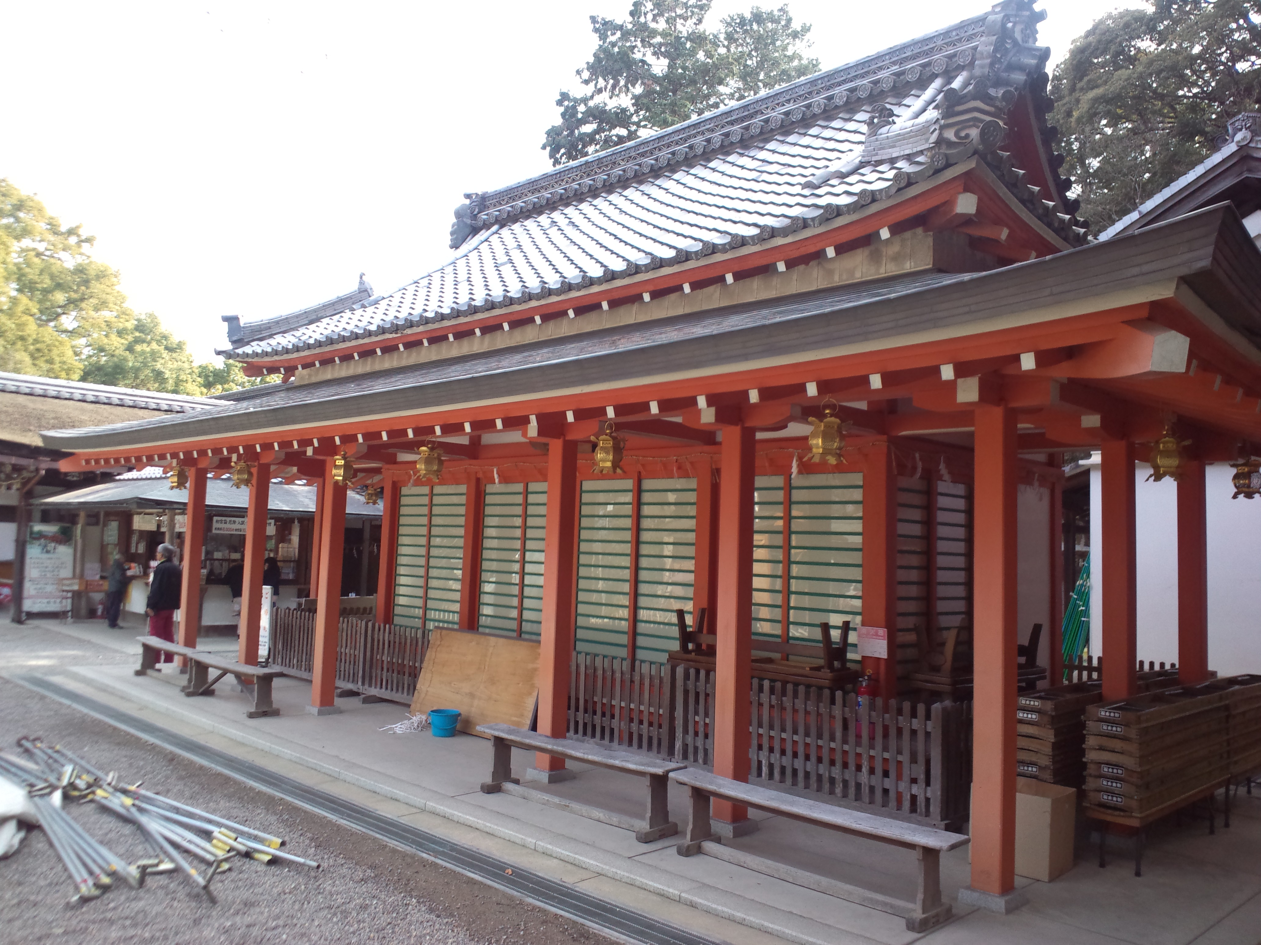 長岡天満宮 紅梅殿